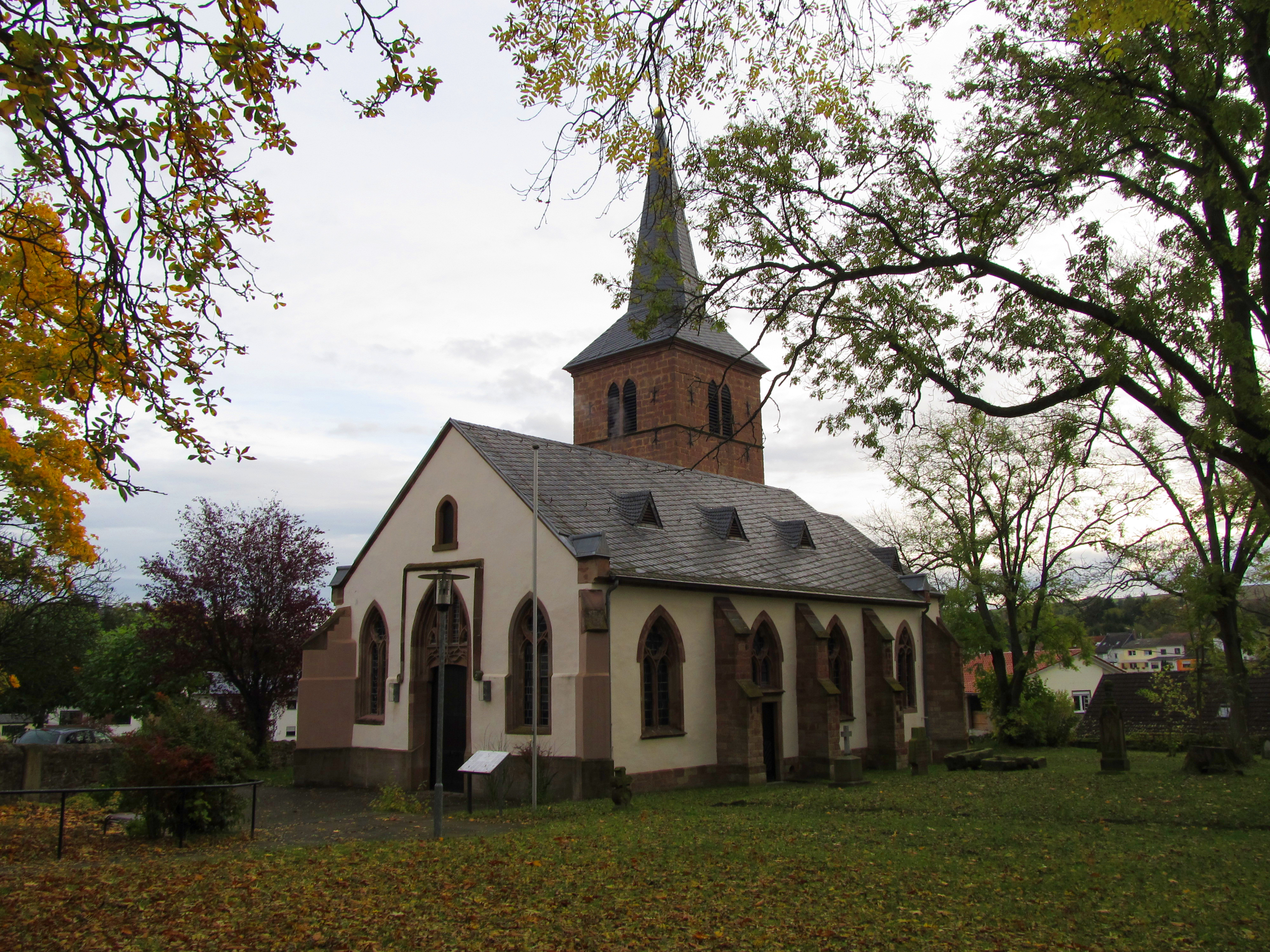 Die evangelische Martinskirche in Köllerbach, einem Stadtteil von Püttlingen, Saarland